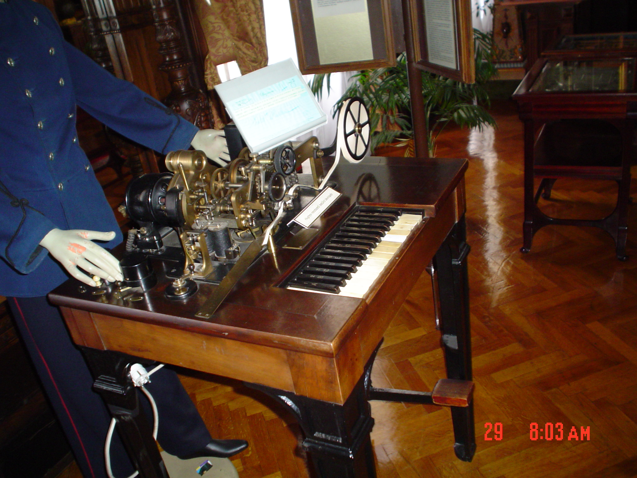 Sinkrona telegrafo de Hughes.